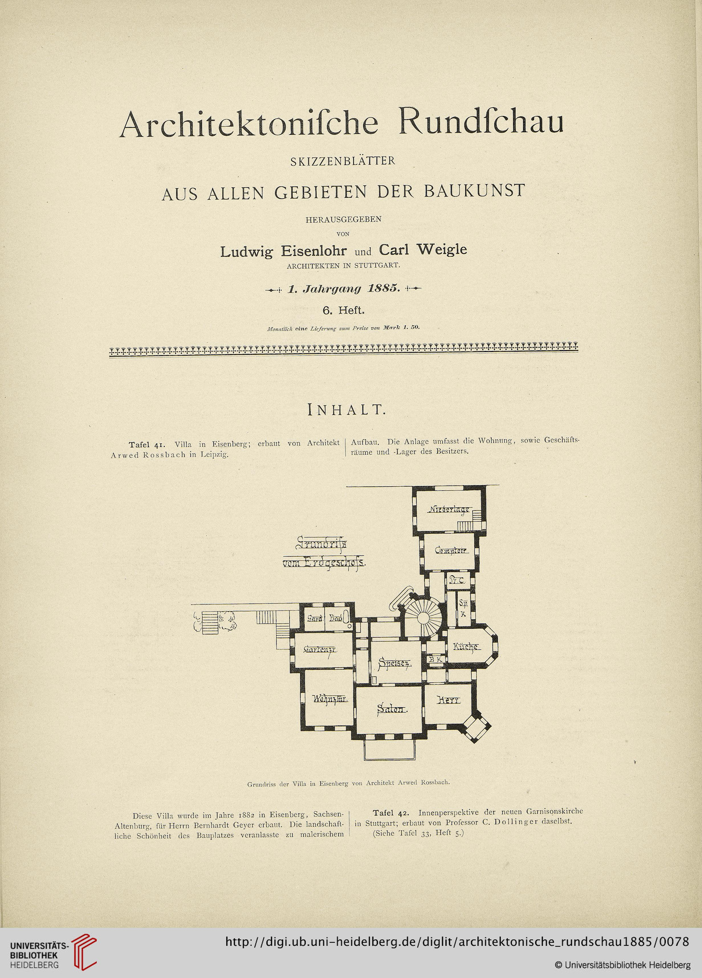 Villa für Bernhard Geyer in Eisenberg, Südstraße 1, erbaut von Arwed Roßbach. Entwurf & Ausführung 1882 Beschreibung und Grundriss